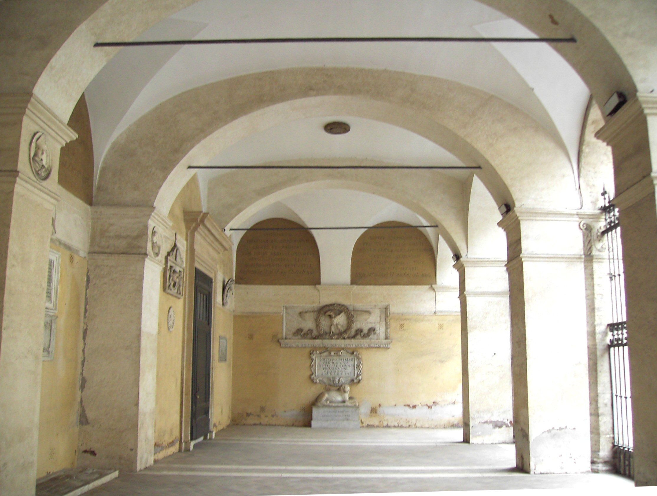 Roma, Basilica dei santi Apostoli: portico